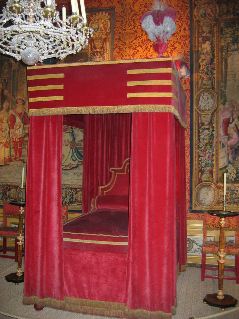 Chambre de Nicolas Fouquet au Château de Vaux-le-Vicomte, France